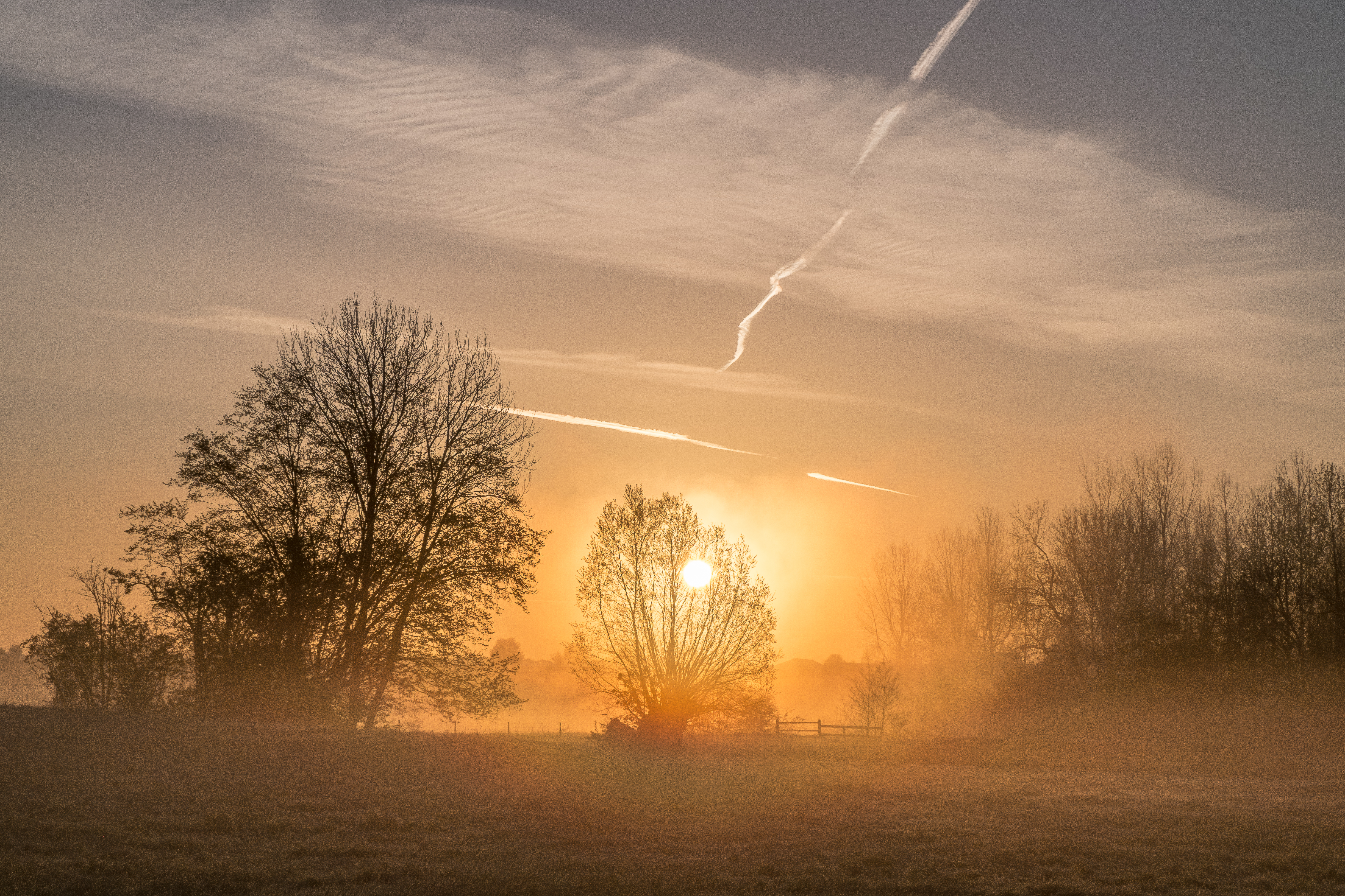 Autre coup de gel tardif dans la vallée de l'Helpe Majeure (qui est certes très gélive). Brume présente, comme souvent.